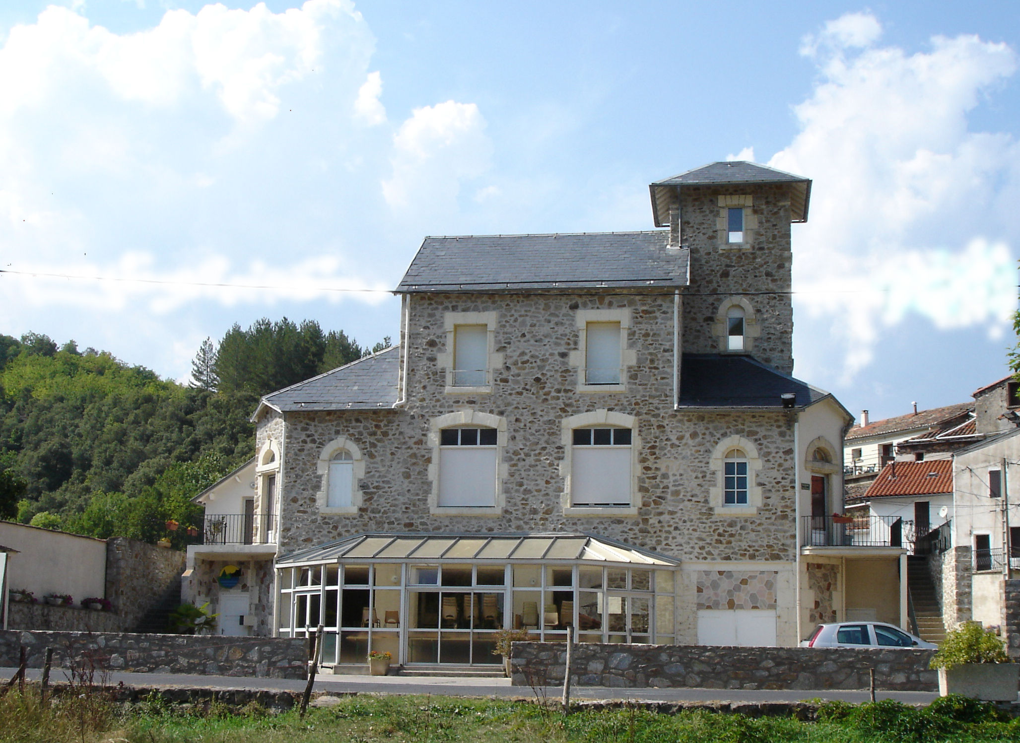 Rosis (Hérault, France) : La mairie.